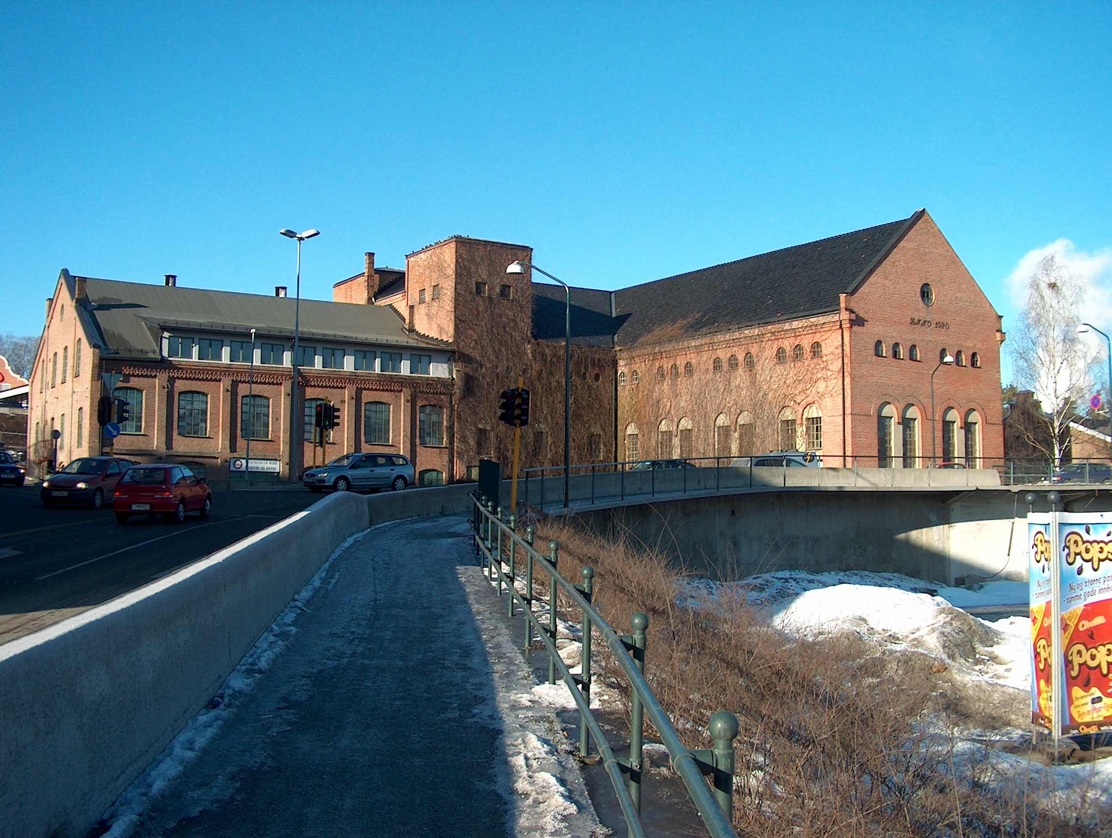 Hønefoss kraftstasjon I